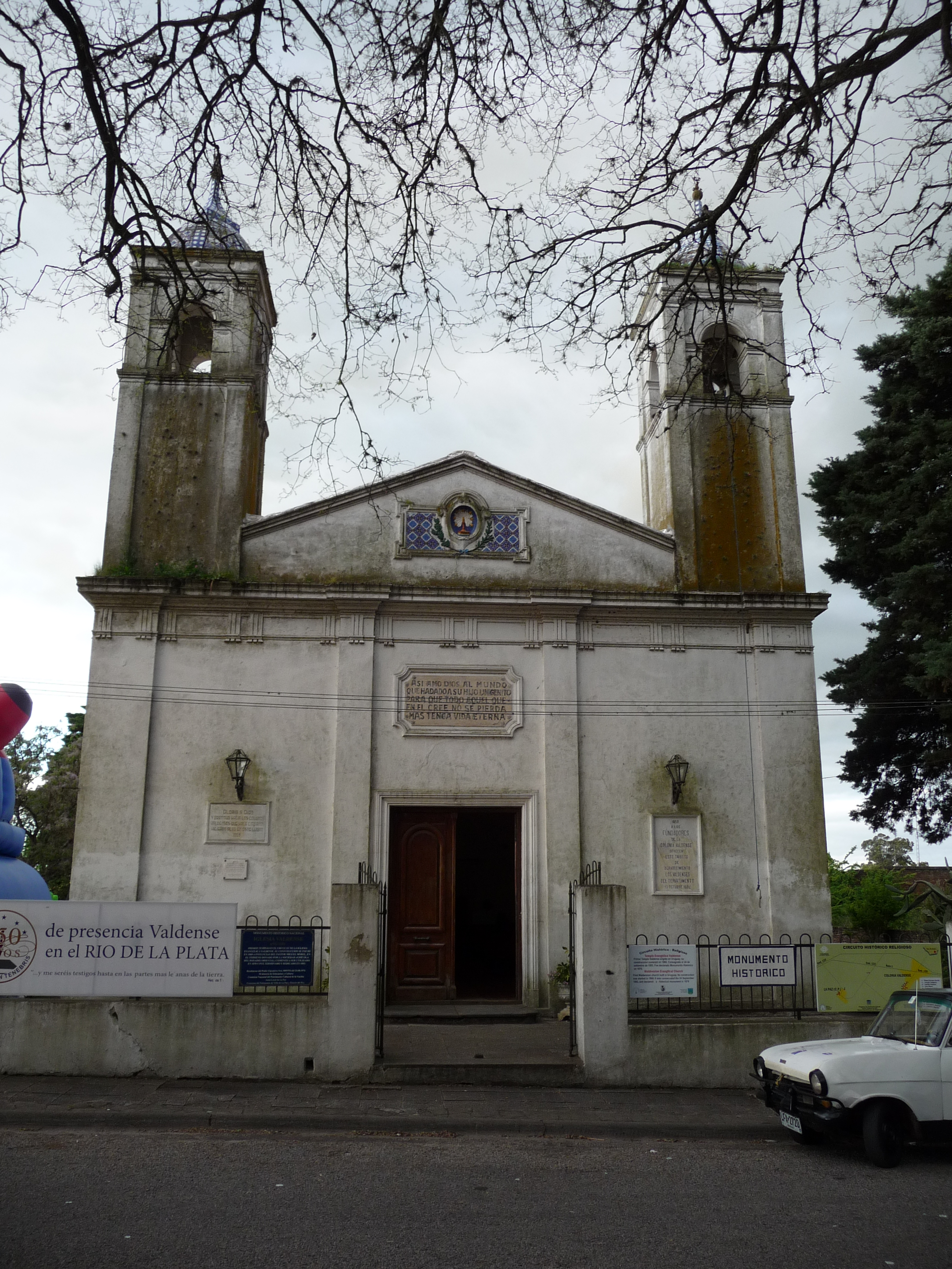 Iglesia Evangélica Valdense de la Colonia Piamontesa. Ubicada en el departamento de Colonia